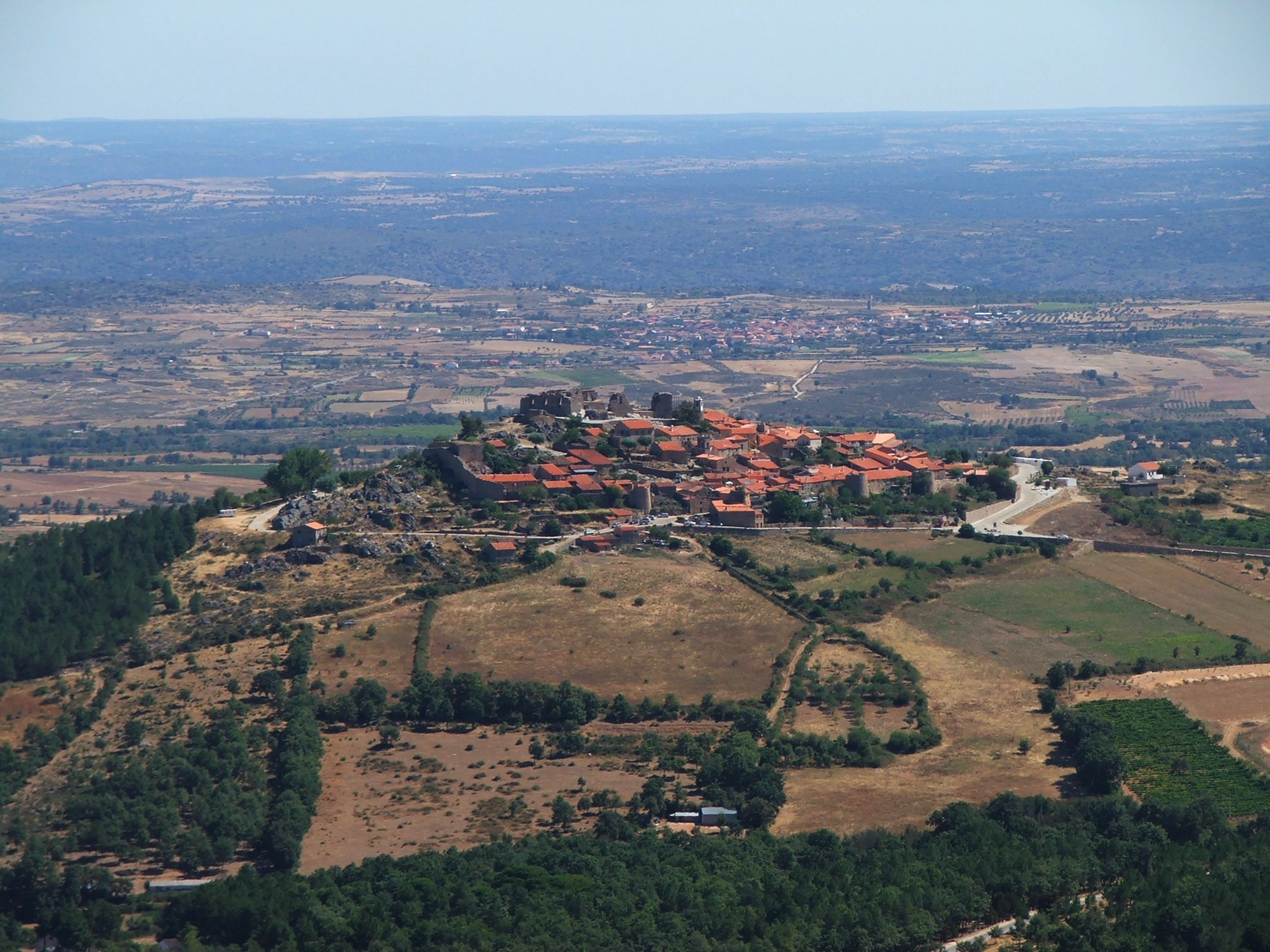 São duas as fases medievais essenciais da história deste castelo: a construção leonesa, de finais do século XII ou inícios do século XIII, e a reforma patrocinada por D. Dinis, na primeira metade do século XIV. Depois de 1640, com a Restauração da Independência, o paço foi arrasado pela população (que o via como uma marca do domínio espanhol, mesmo tendo o seu promotor falecido há quase três décadas), permanecendo em ruínas até à actualidade. Actualmente, todo o núcleo histórico de Castelo Rodrigo está integrado na lista das Aldeias Históricas de Portugal.